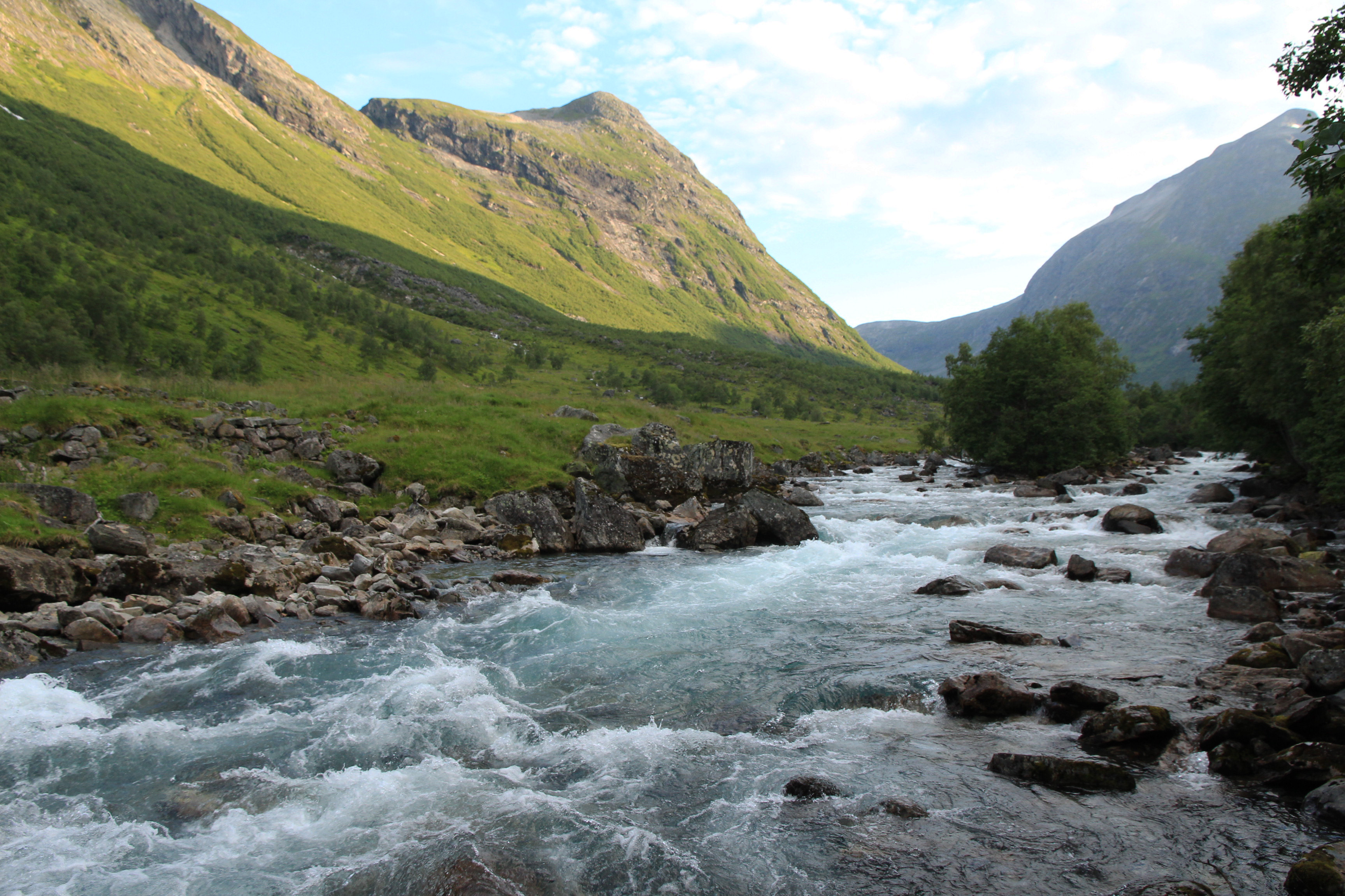 Valldøla